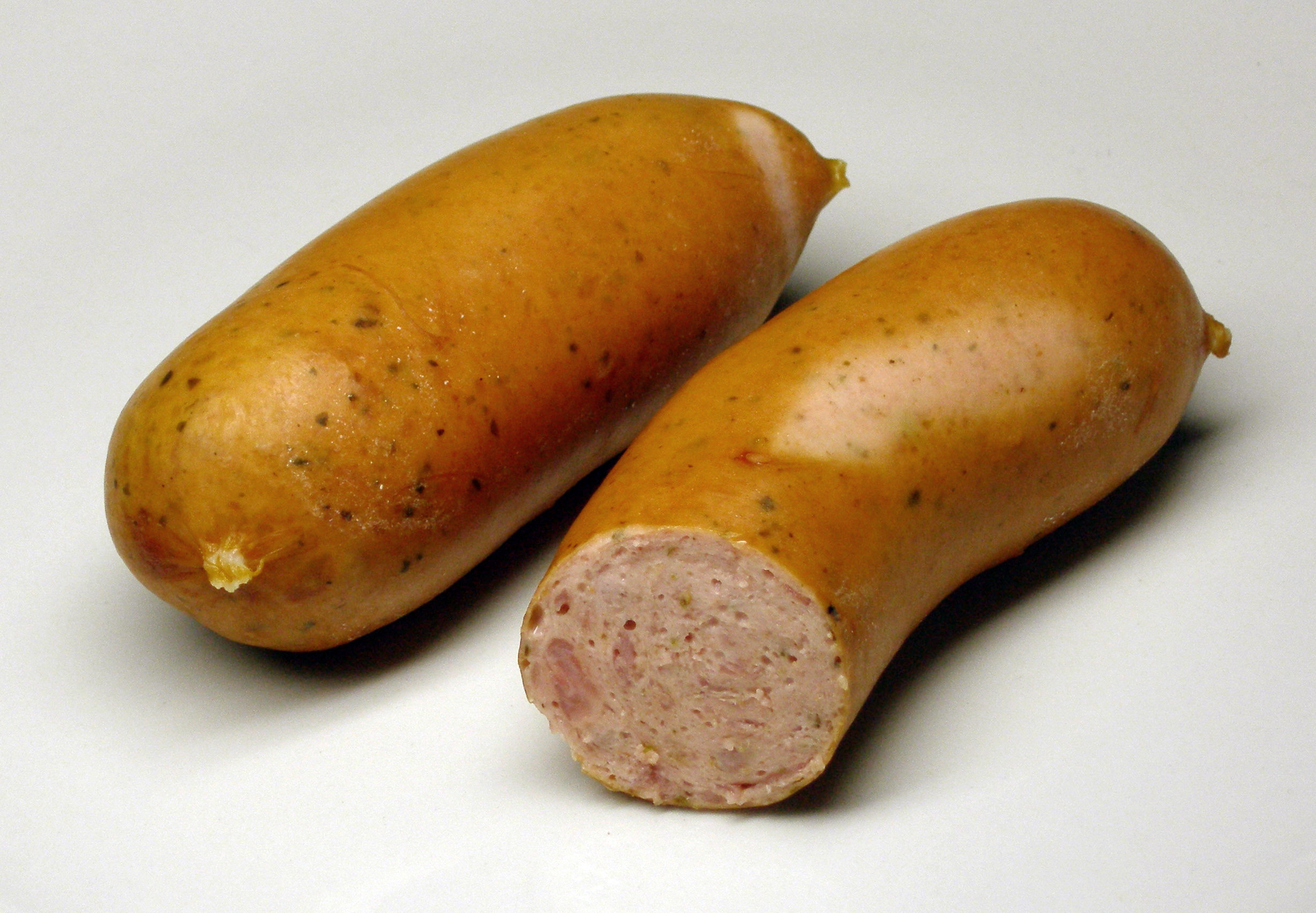 Regensburger, a German sausage